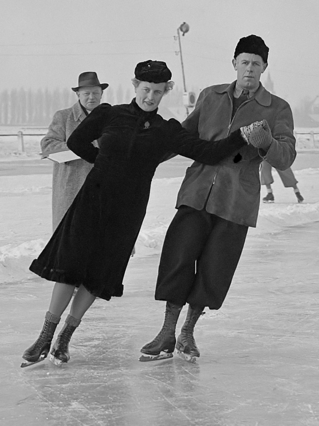 Schoonrijden Hoofddorp Kampioen Noord-Holland mejuffrouw Molenaar meneer Wesseloo 29 december 1950